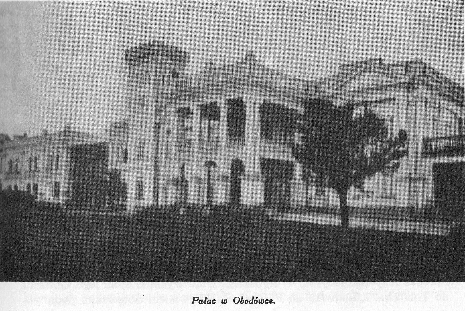 Obodówka